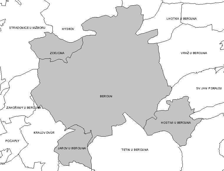 Katastrální území Berouna